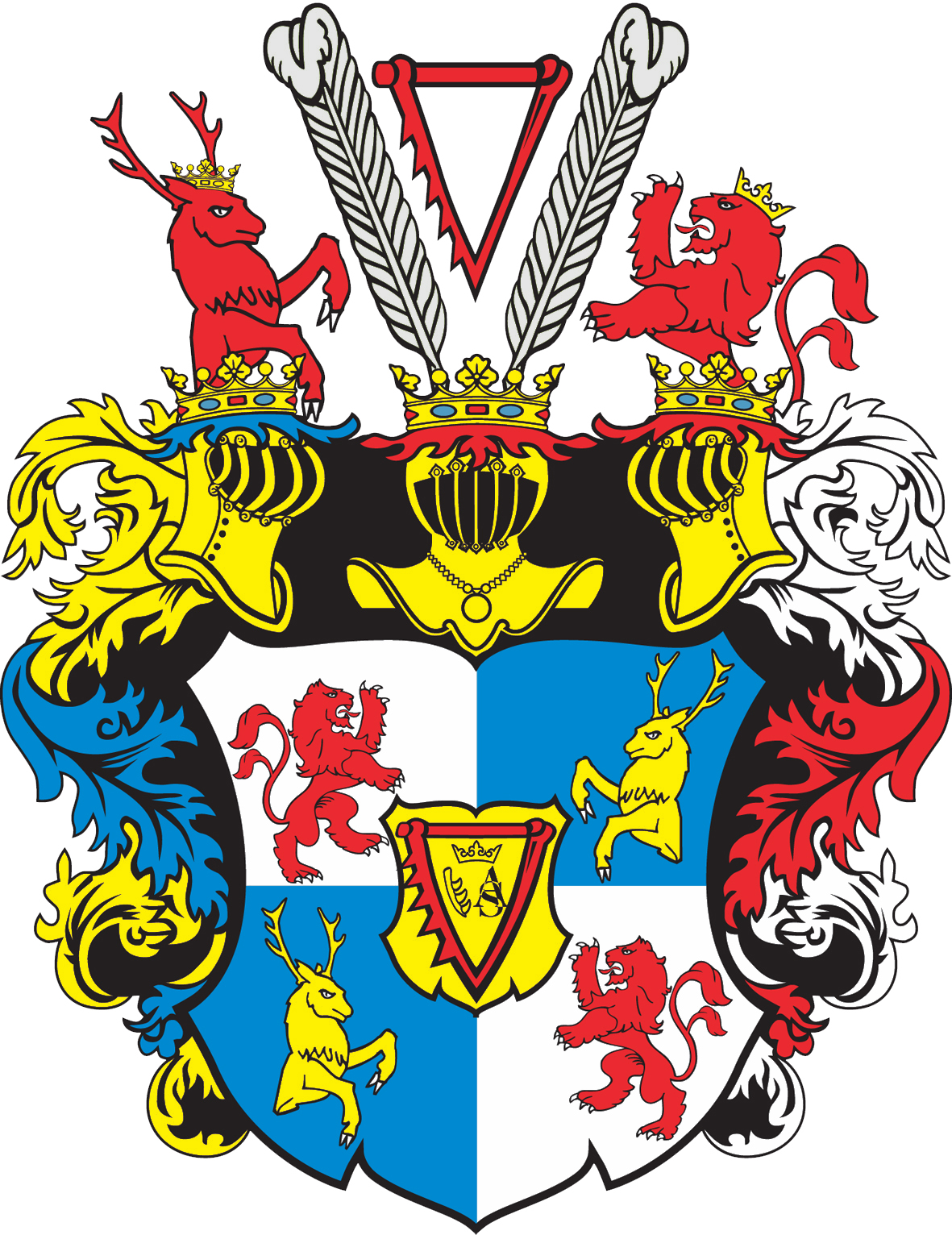 Kurzemes un Zemgales hercogistes ģerbonis 1565.-1737. g. (Coat of Arms of Duchy of Courland and Semigallia); patiesībā hercogu Ketleru dzimtas ģerbonis (Coat of Arms of House of Kettler, Dukes of Courland and Semigallia). Ģerboni dzimtai piešķīris 1565. gadā Žečpospoļitas karalis Sigismunds Augusts. Atsevišķas ģerboņa detaļas un to izvietojums mainījās laika gaitā. Pārzīmējis ievietošanai A.Buks.